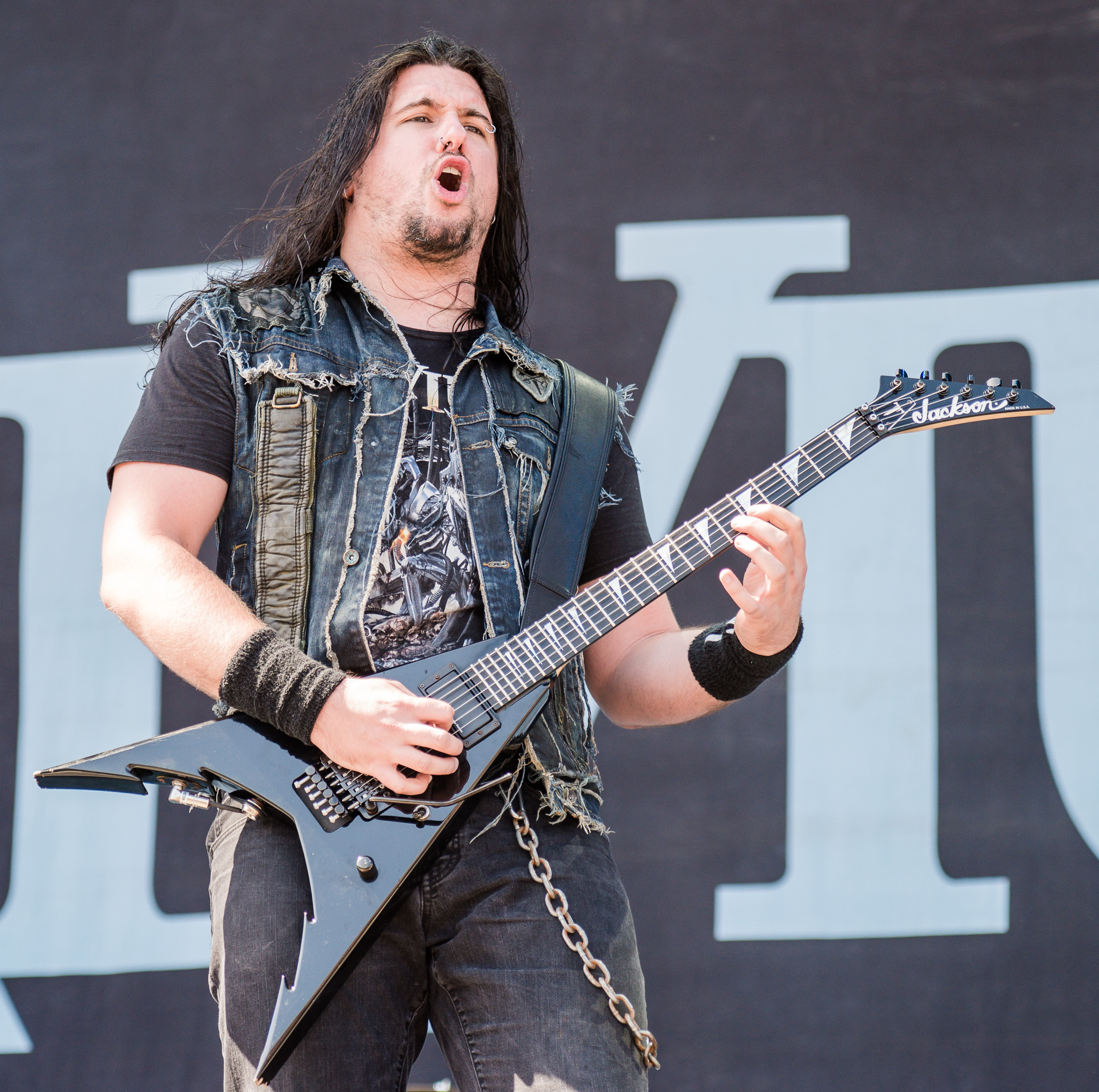 ARGO-Konzerte,Centerstage,Corey Beaulieu,Konzert,Livekonzert,Livemusik,Musik,RiP,Rock im Park 2014,Trivium